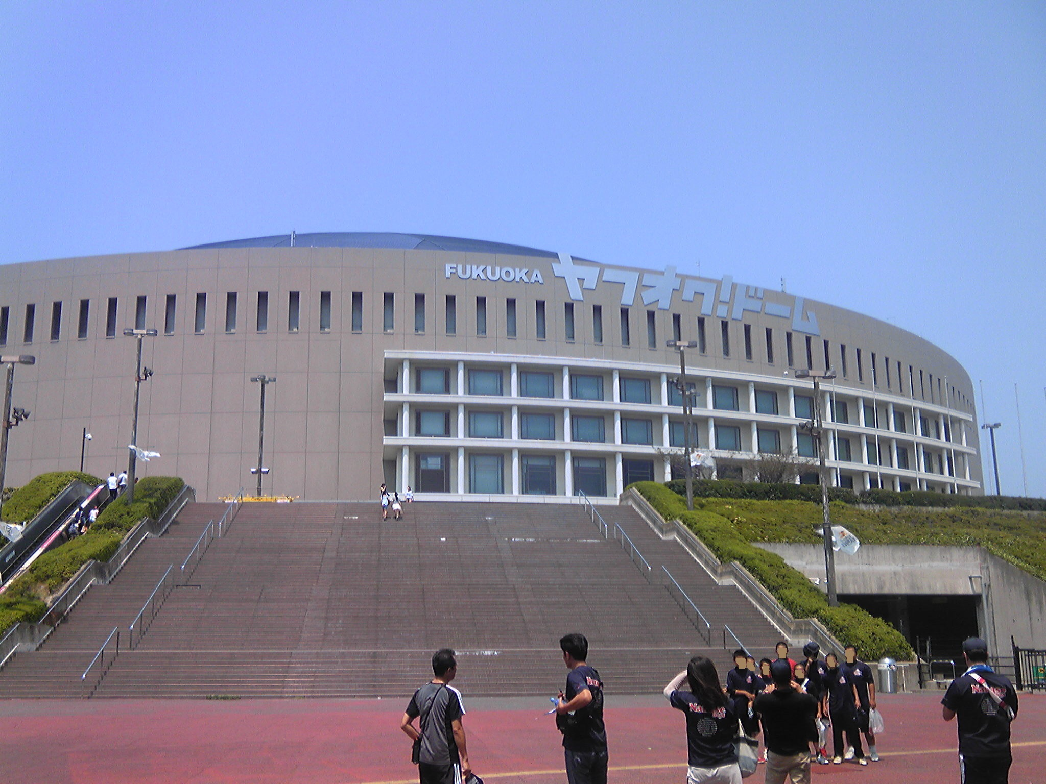 福岡ドーム（ヤフオク！ドーム・福岡市中央区地行浜）